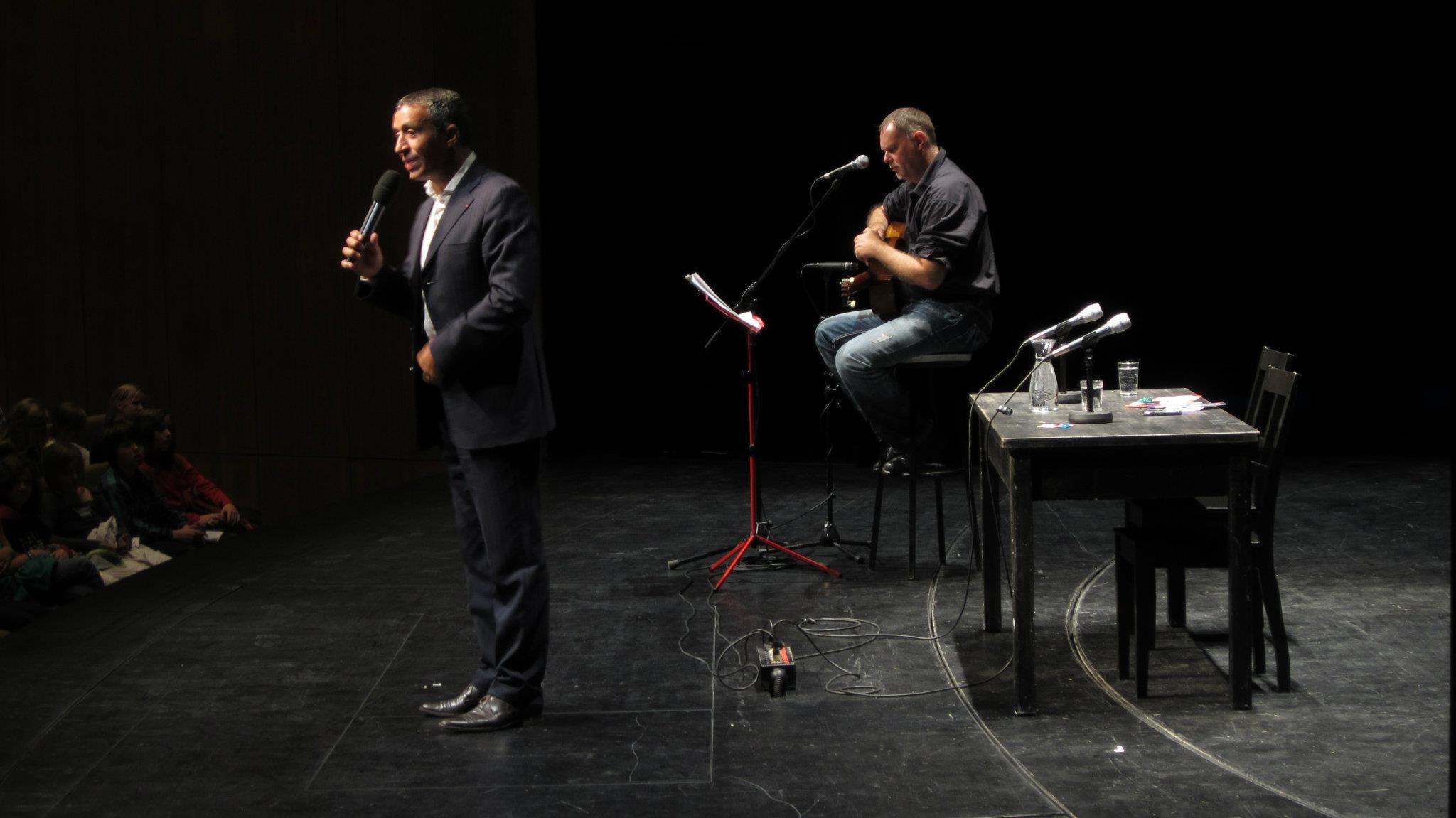 Azouz Begag zusammen mit Gilles Floret im Rahmen des Kinder- und Jugendprogramms des 11. Internationalen Literaturfestivals Berlin am 12.09.2011 auf der Großen Bühne im Haus der Berliner Festspiele.